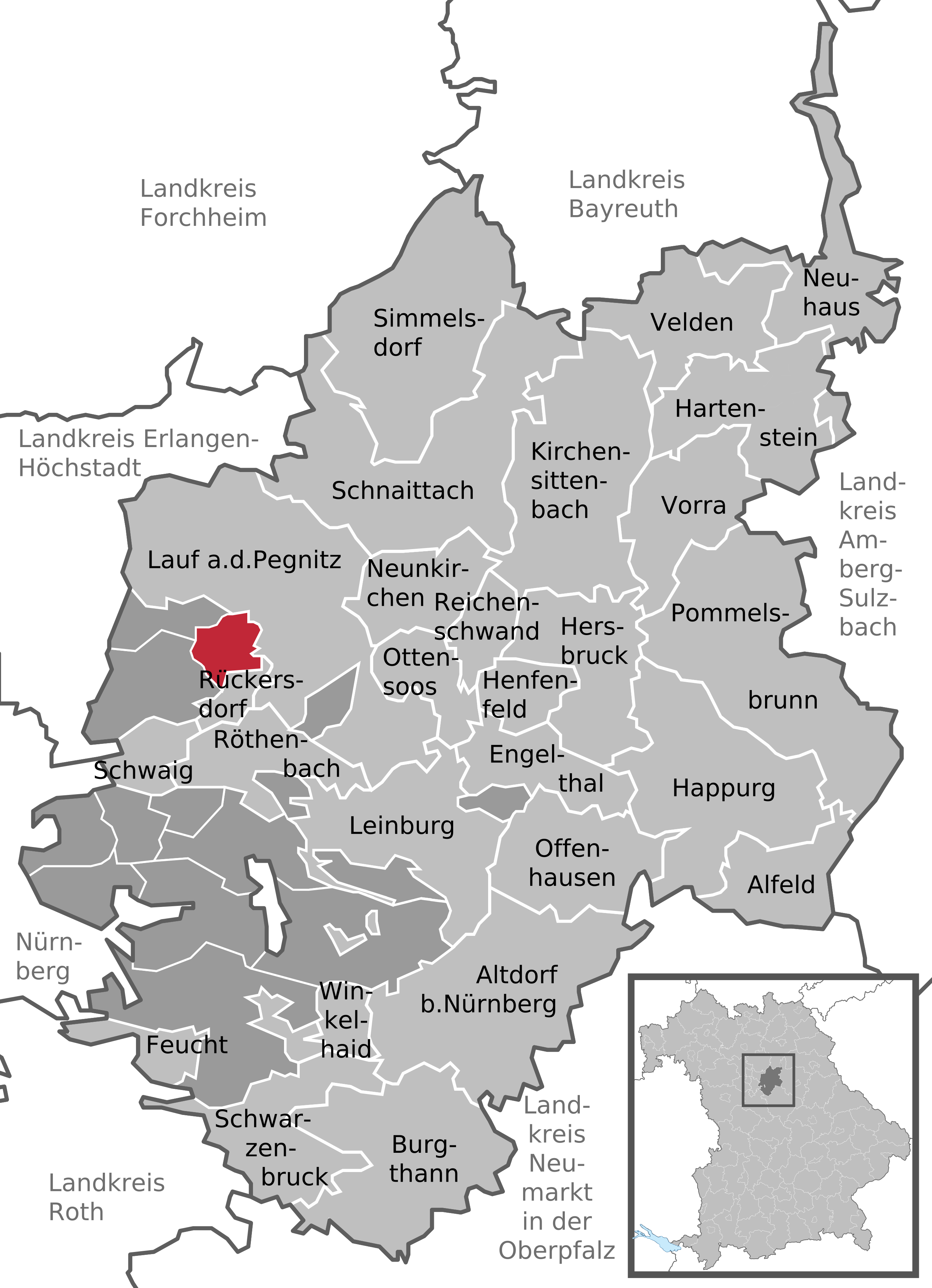 Positionskarte des gemeindefreien Gebietes Rückersdorfer Forst